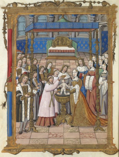 Baptême de Sigebert III. Guillaume Crétin, chroniques françaises du XVIème siècle (après 1515). Manuscrit de Rouen, Bibliothèque Nationale de France.